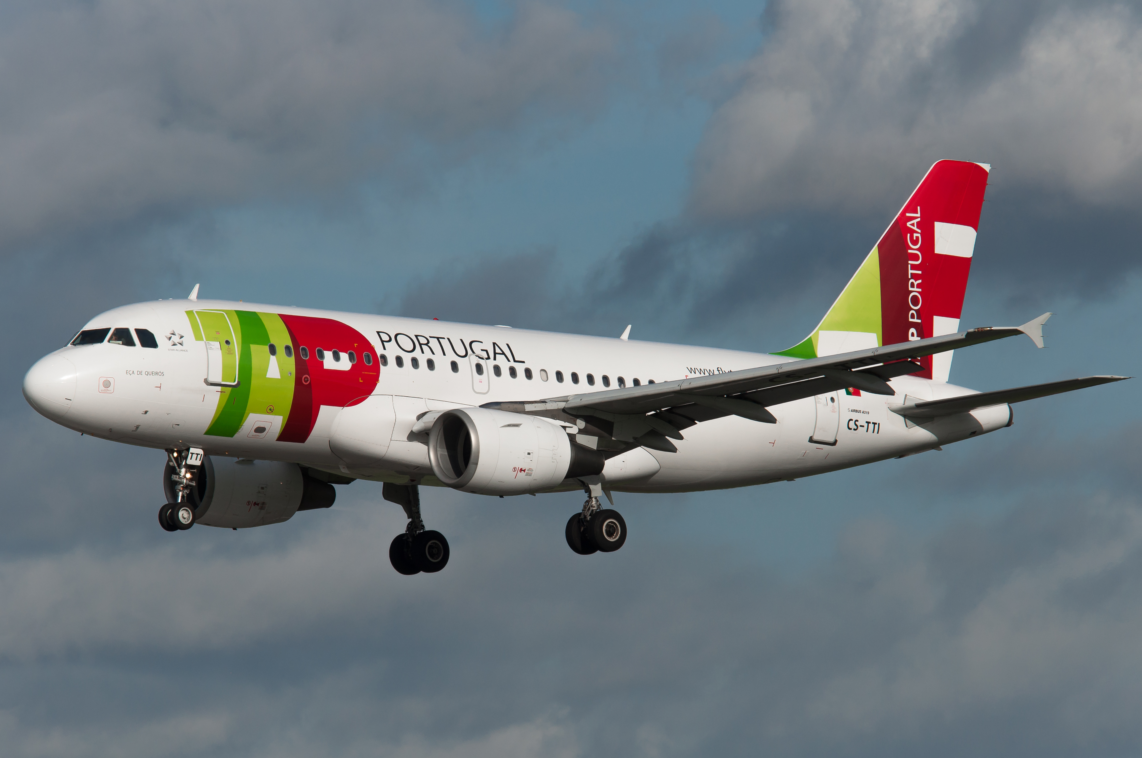 Dusseldorf, 3-11-2013